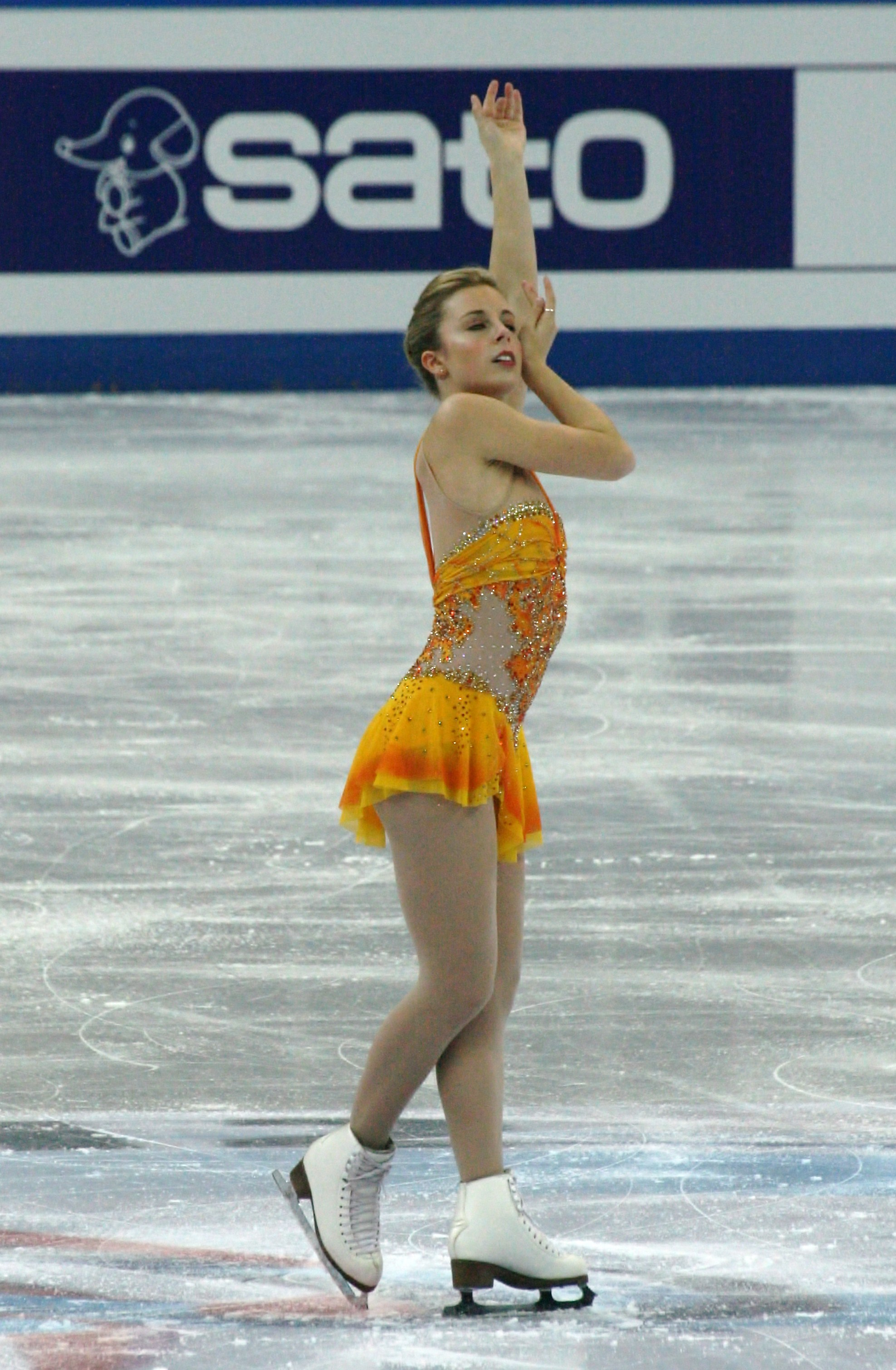 Эшли Вагнер (США) на финале Гран-при 2012-2013. Произвольная программа.